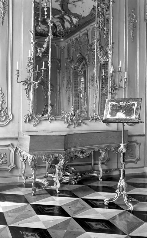 Potsdam.- Sanssouci, Musikzimmer im Neuen Palais